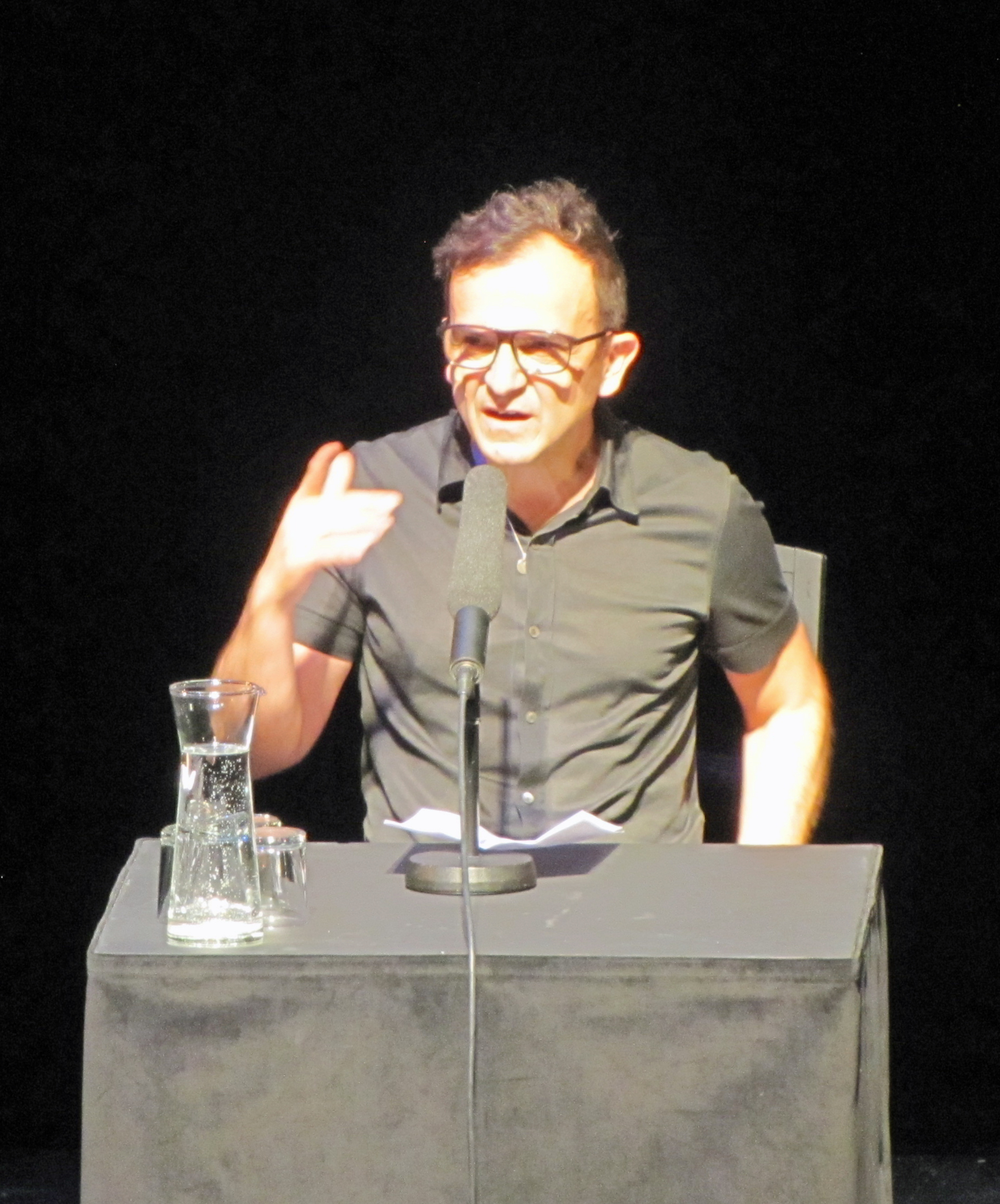 İmran Ayata, am 21. Mai 2017, auf der Bühne des Schauspiel Frankfurt bei der Solidaritäts-Matinee für Deniz Yücel und inhaftierte Journalistinnen und Journalisten in der Türkei.